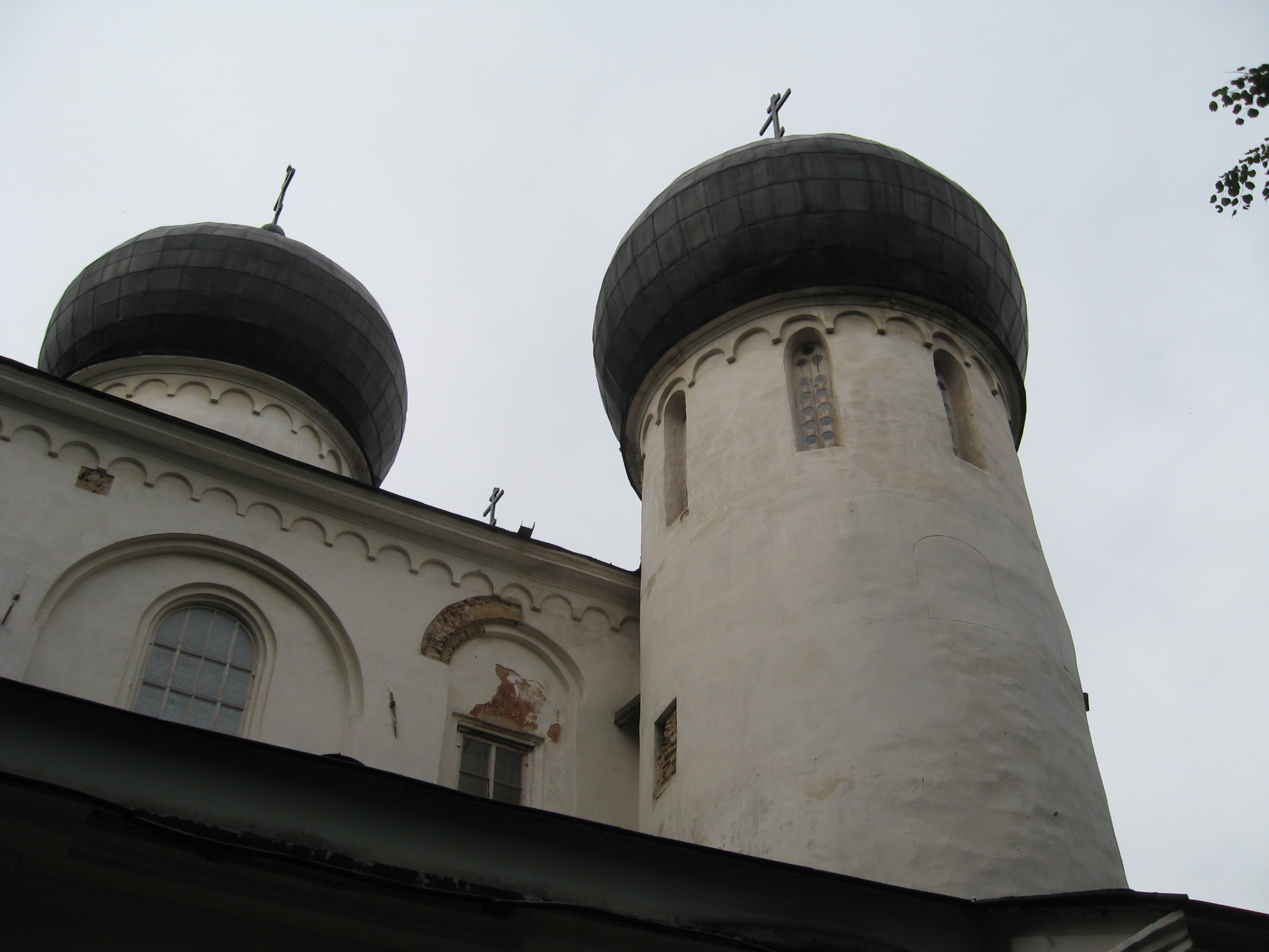 Лестничная башня собора Рождества Богородицы Антониева монастыря в Великом Новгороде.